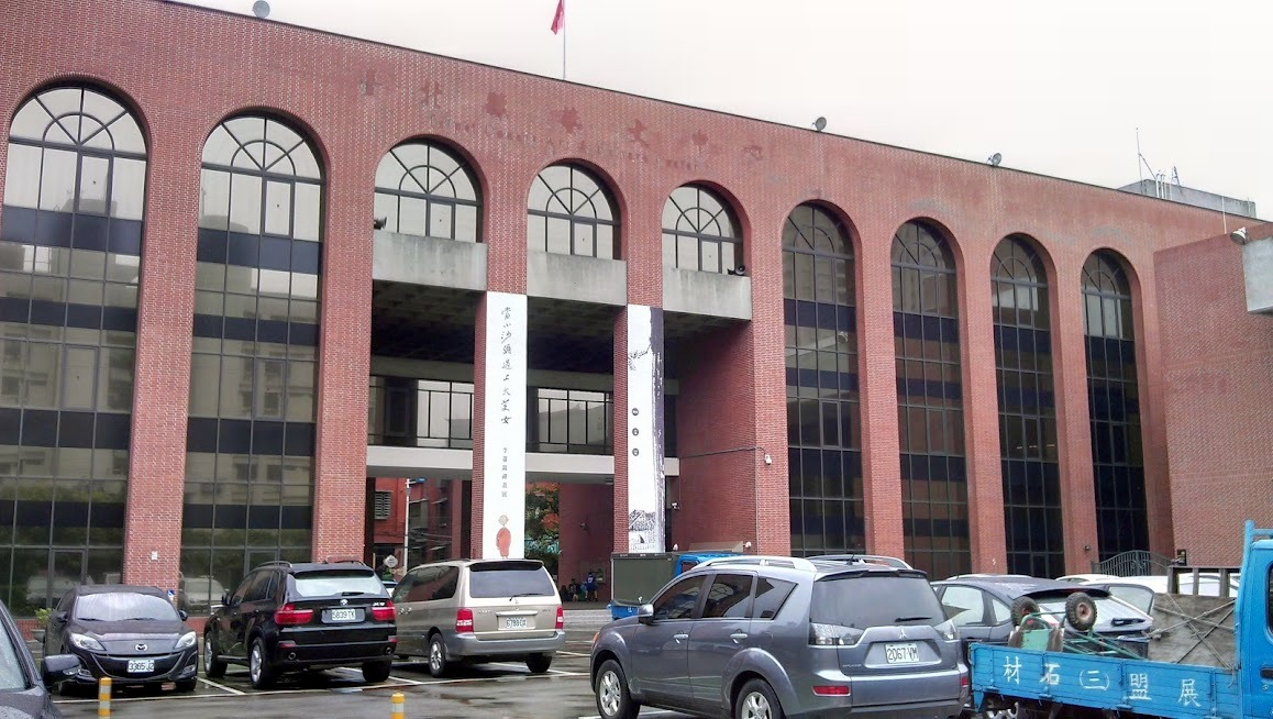 中文（台灣）: 新北市立圖書館總館大樓。